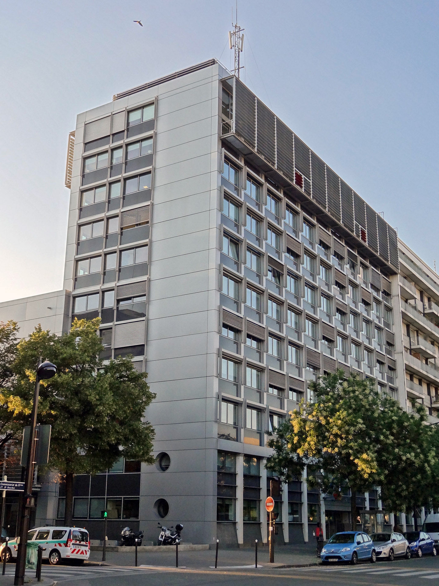 Immeuble de la RATP abritant les postes de commandes centralisées (PCC) de plusieurs lignes de métro, boulevard Bourdon, Paris 4e, France.